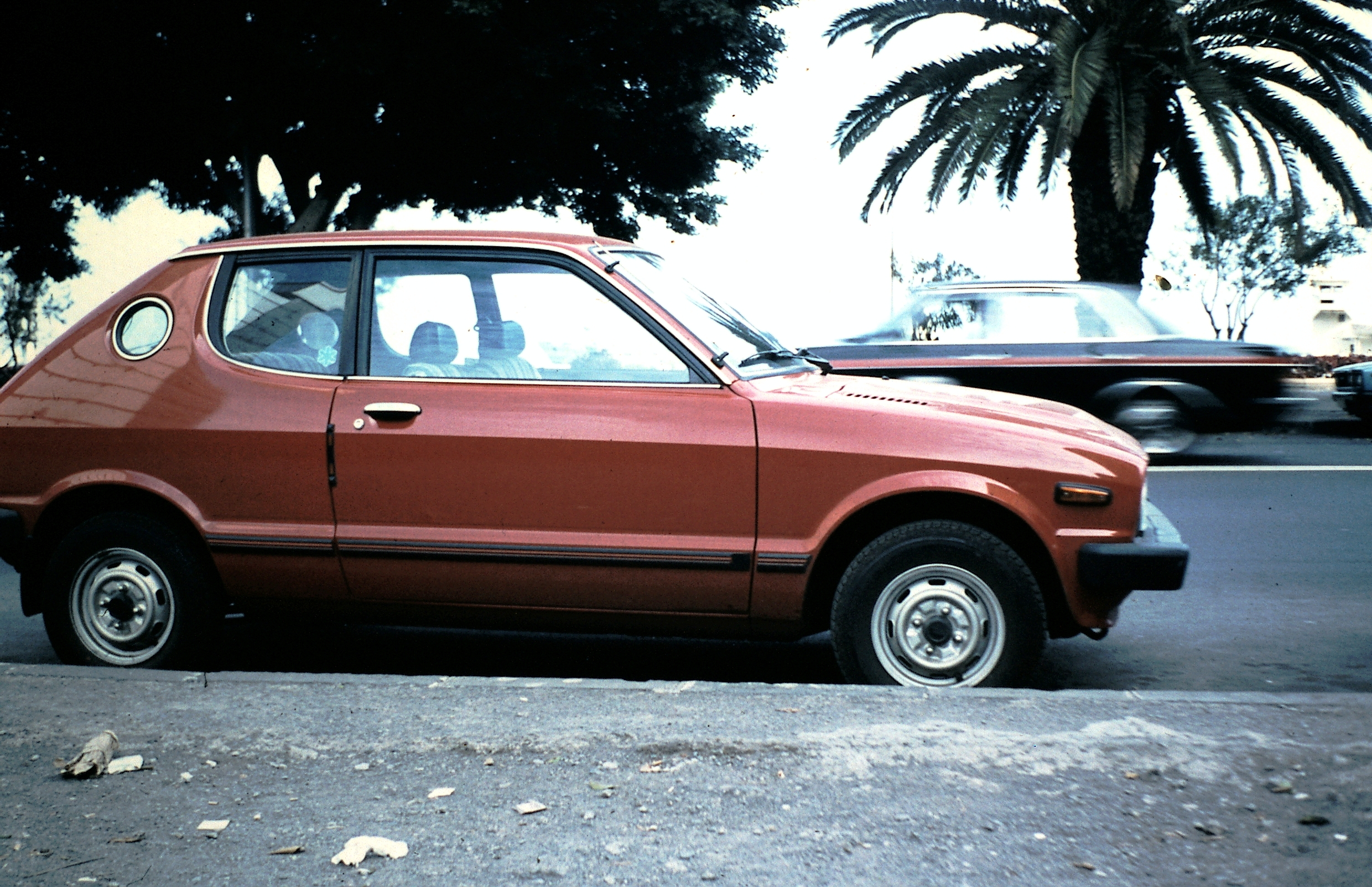 Daihatsu_Charade_2d